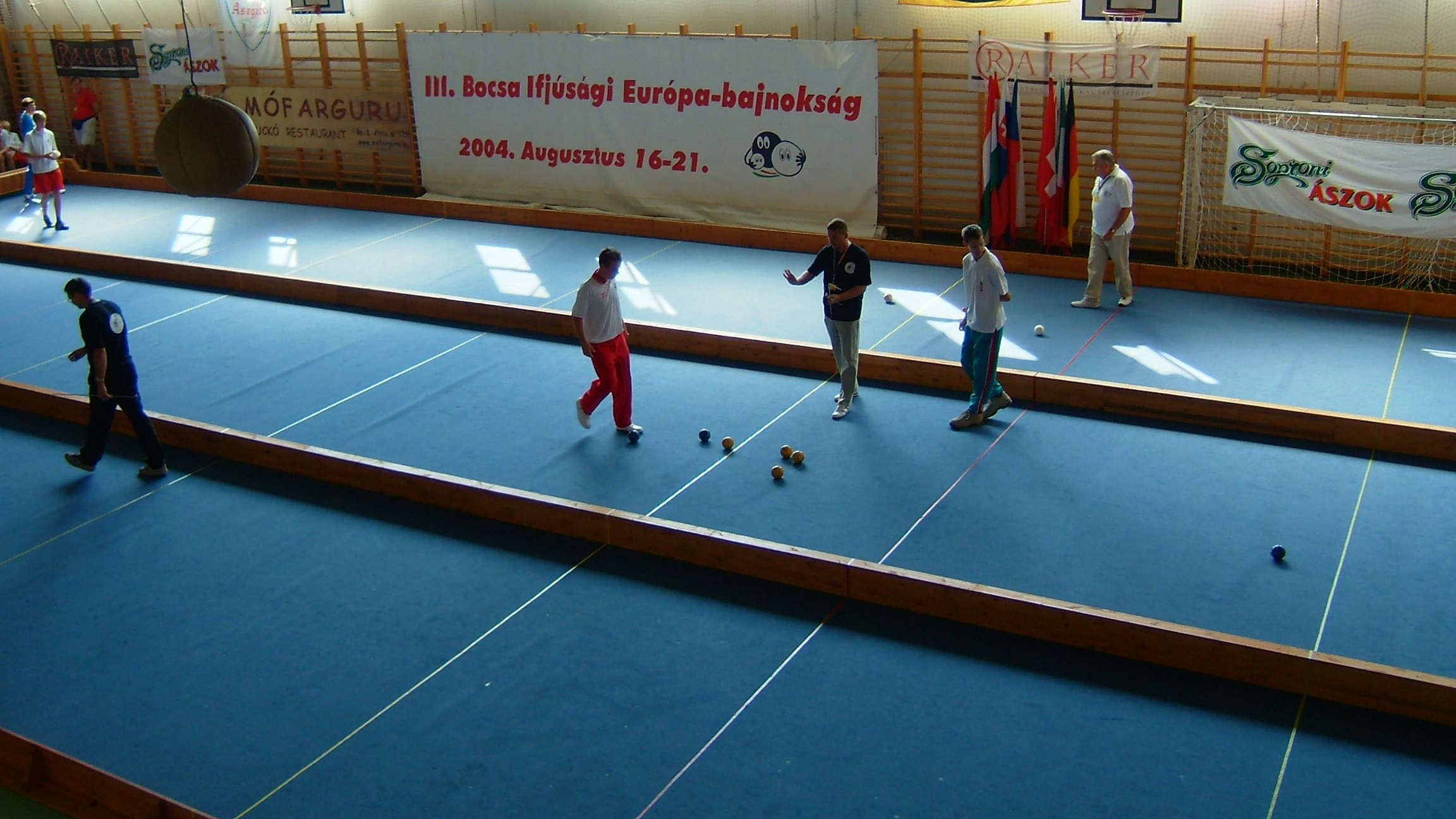 Szőnyegborítású bocsapálya Budapesten